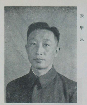 中文（台灣）: 中國人民政治協商會議第一屆全體會議代表